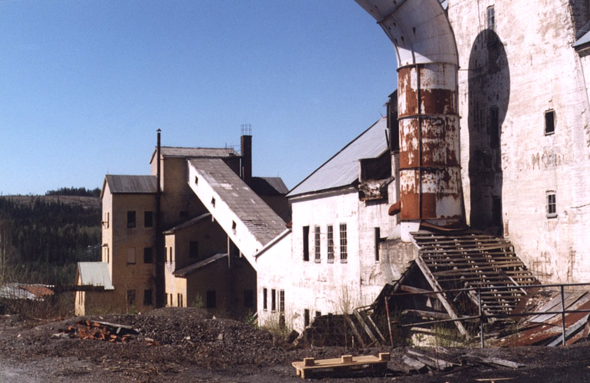 Ställbergs gruva år 2000 Foto:Cucumber